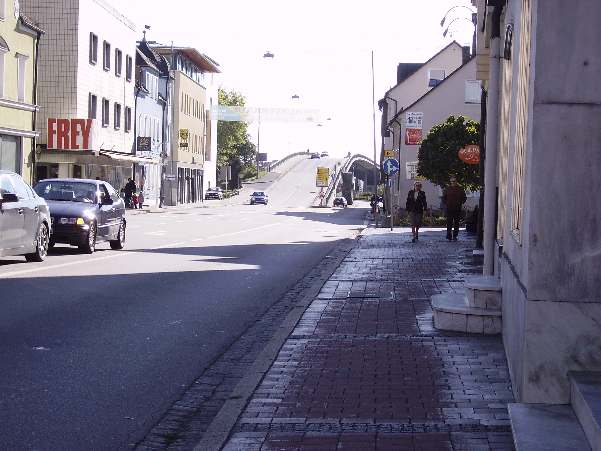 Beschreibung: Adenauer Brücke in Schwandorf Quelle: Bild selbst erstellt Datum: 21. Dezember 2006 Autor: Midtown Manhattan